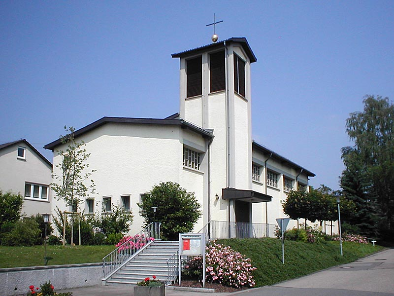 Katholische Kirche in Hüffenhardt // Catholic church in Hüffenhardt, germany